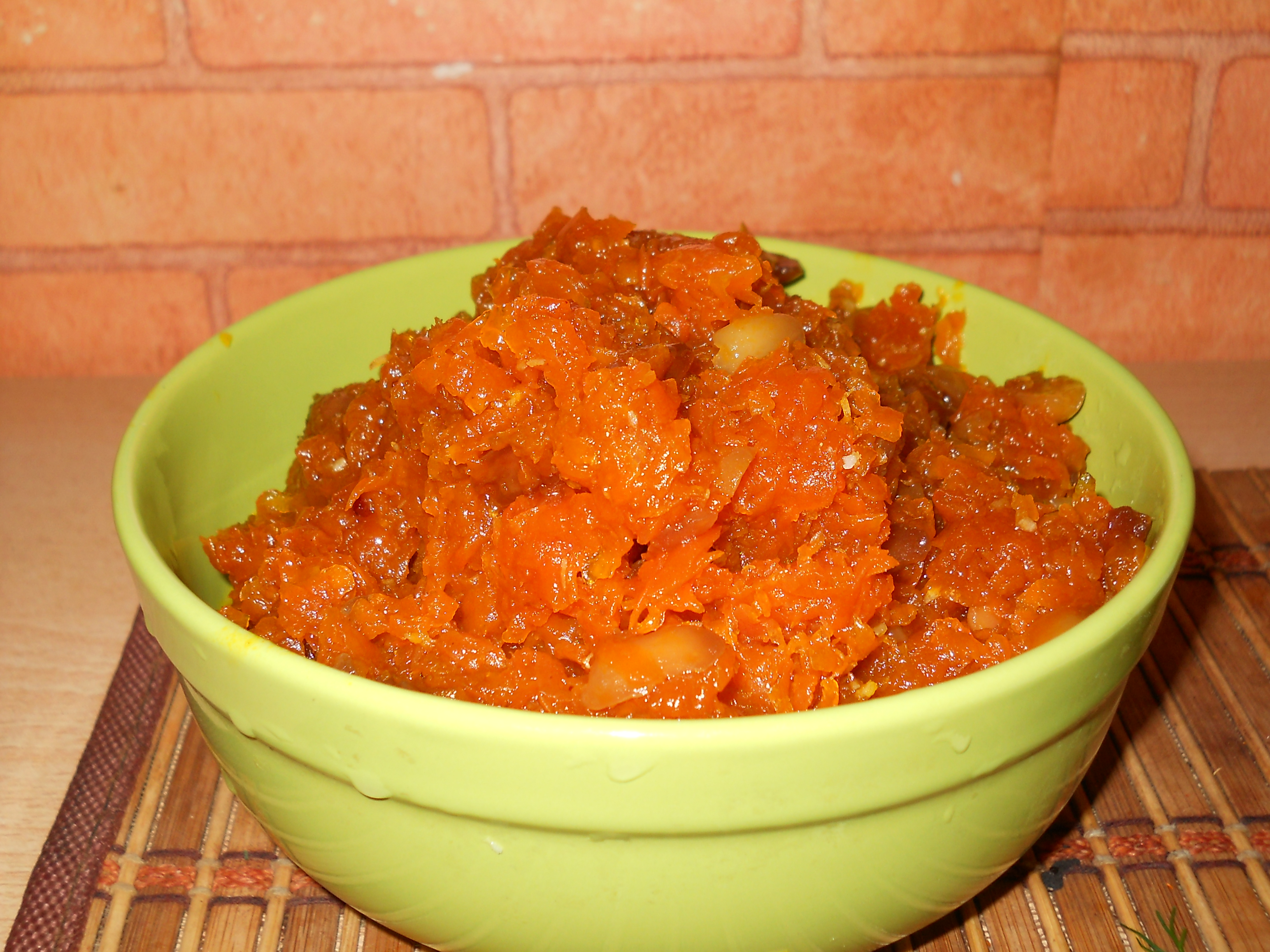 Морковная халва в вайшнавской традиции есть лакомство